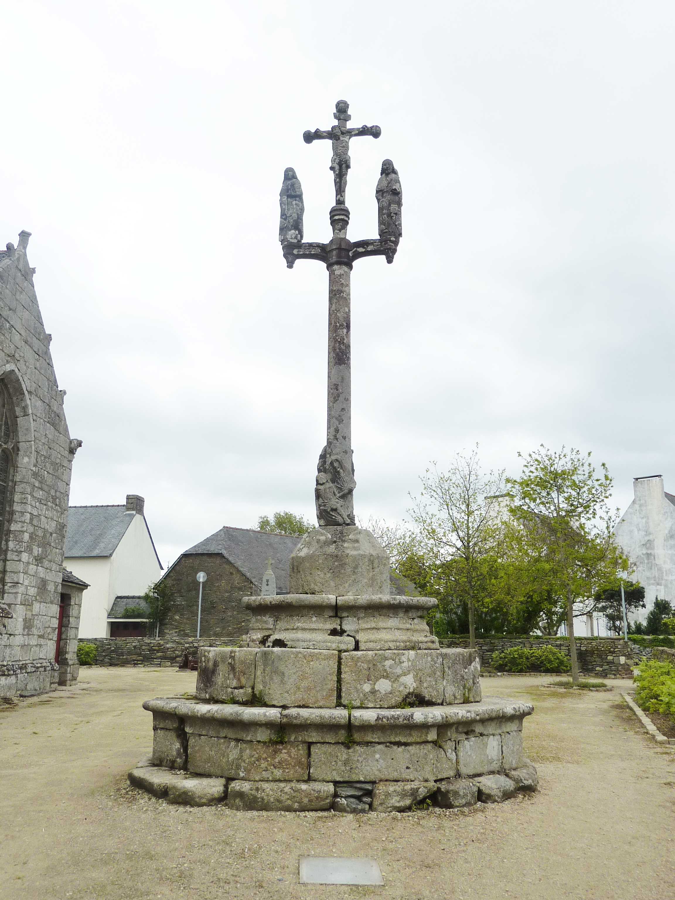 Cast (Finistère) : le calvaire de l'enclos paroissial It is indexed in the Base Mérimée, a database of architectural heritage maintained by the French Ministry of Culture, under the references PA00089866 and IA00005309. This object is classé Monument Historique in the base Palissy, database of the French furniture patrimony of the French ministry of culture, under the references IM29000994, IM29000996 and IM29001437.